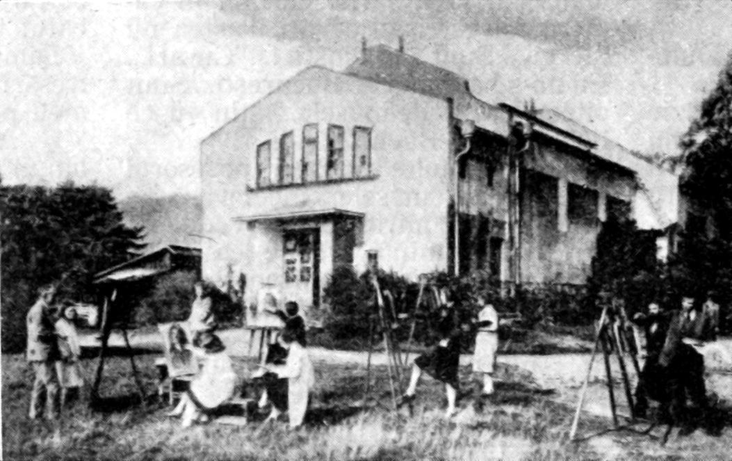 Scoala de pictura de la Baia Mare (foto 1930)